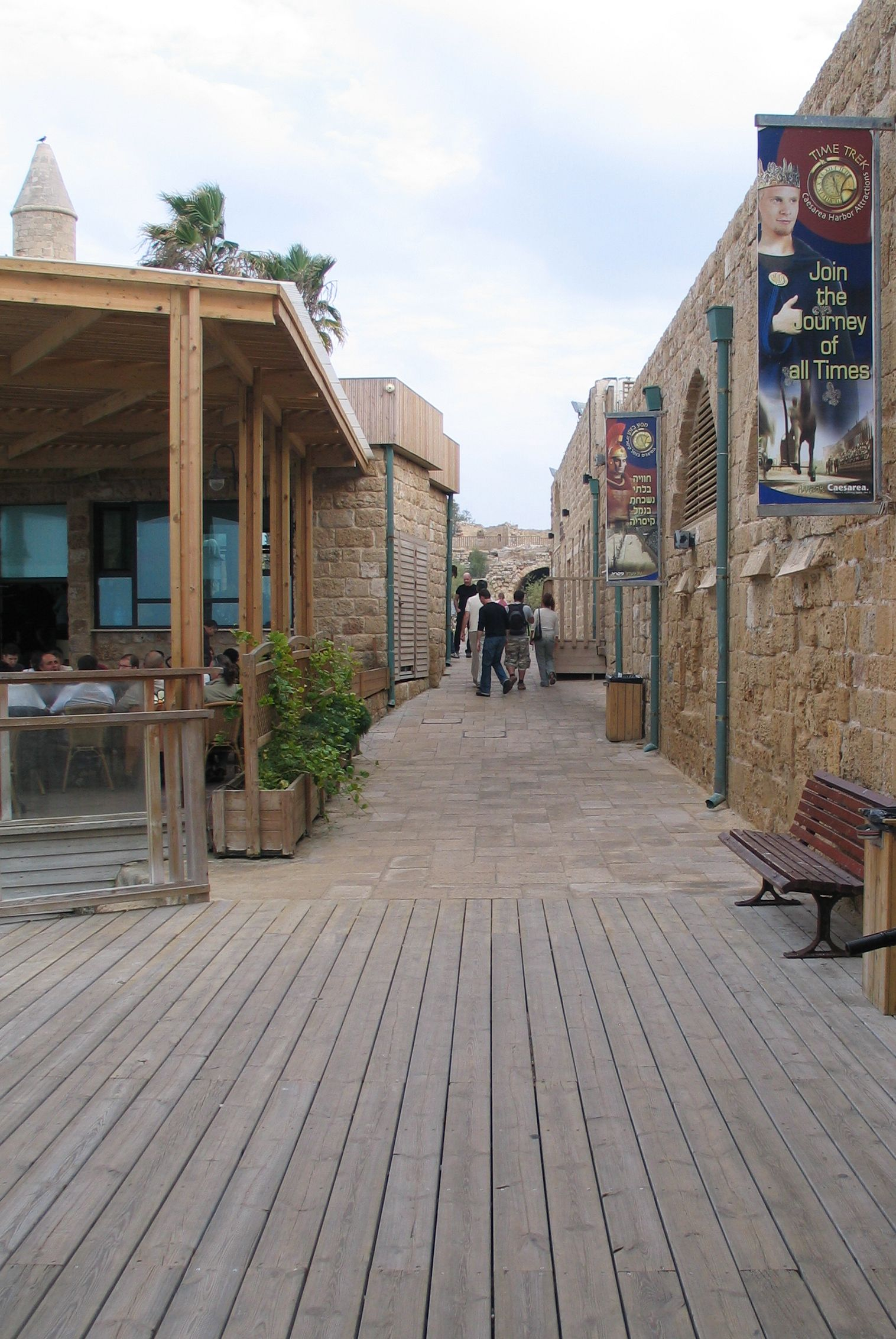 Caesarea Maritima, Israel.